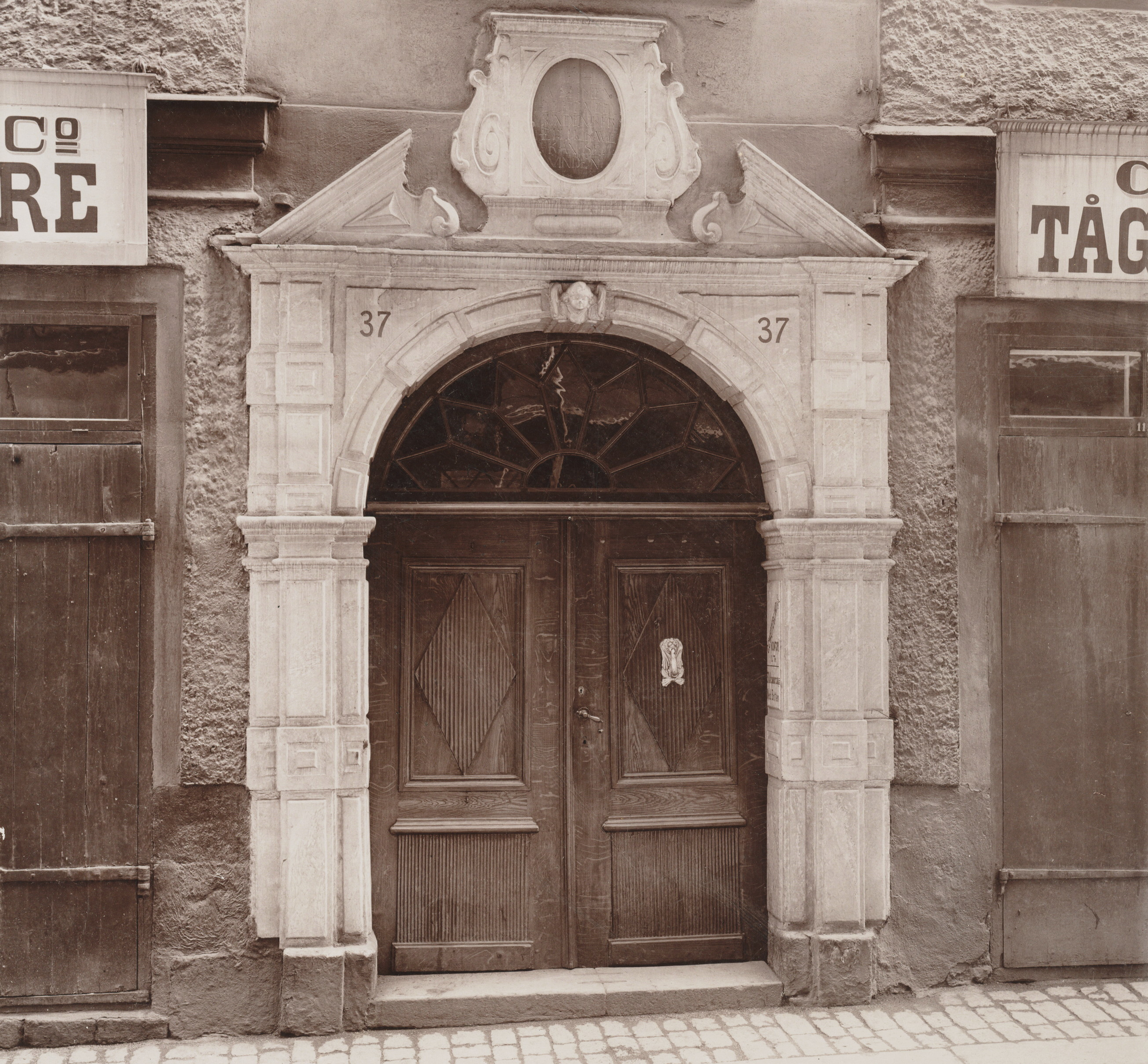 Österlånggatan 37, portal med holländsk inskription: GAET. HET. WEL. MEN. HEEFT. VEEL. VRINDEN. KERT. HET. LÜCK. WIE. KAN. SE. VINDEN (översättning): Går det väl, har man många vänner. Vänder lyckan - var då finna dem? [kan vi se vinden]